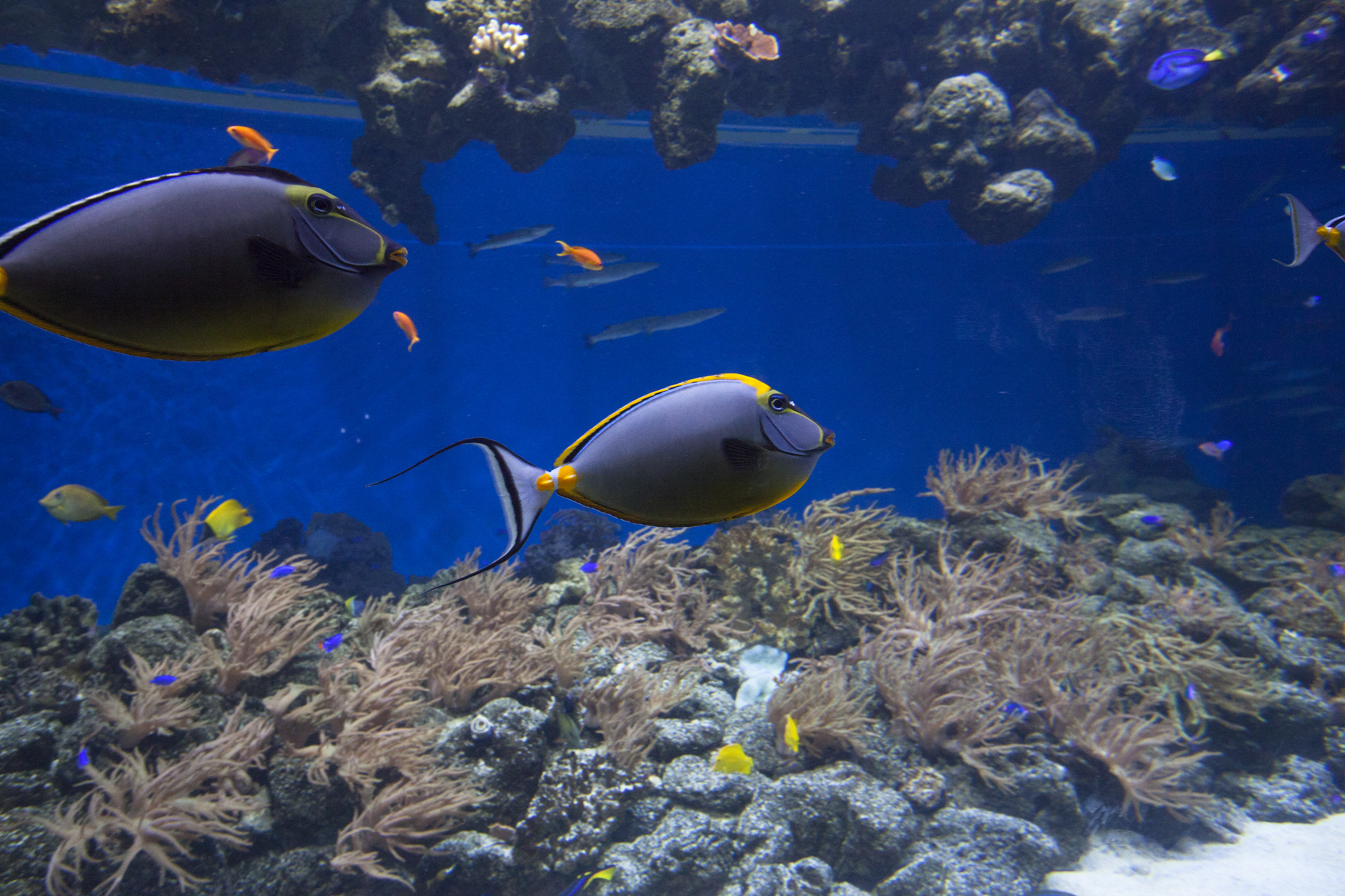 Danmarks akvarium i ny byggnad vid Kastrup och under nya namnet Den Blå Planet här med färglada fiskar som visar upp sig för besökarna den 27 april 2013. "The Blue Planet" the new National Aquarium, near Copenhagen. Den Blå Planet ska bli ett nytt internationalt varumärke för Köpenhamn. Med stjärnkocker, speciell arkitektur, 17 000 nya havsdjur och interaktiva upplevelser förväntar sig adm. direktør Dorte Gleie att kunna locka 700 000 besökare om året. Foto: News Øresund – Johan Wessman. © News Øresund. Bilden får fritt publiceras under förutsättning att källa anges (Foto: News Øresund + fotografnamn). The picture can be used freely under the prerequisite that the source is given (Photo: News Øresund + the name of the photografer. Politics. Originalfil tillhandahålles gratis, kontakta: News Øresund, Malmö, Sweden. News Øresund är en oberoende regional nyhetsbyrå som ingår i projektet Øresund Media Platform som drivs av Øresundsinstituttet i partnerskap med Lunds universitet och Roskilde Universitet och med delfinansiering från EU (Interreg IV A Öresund) och 14 regionala; icke kommersiella aktörer.